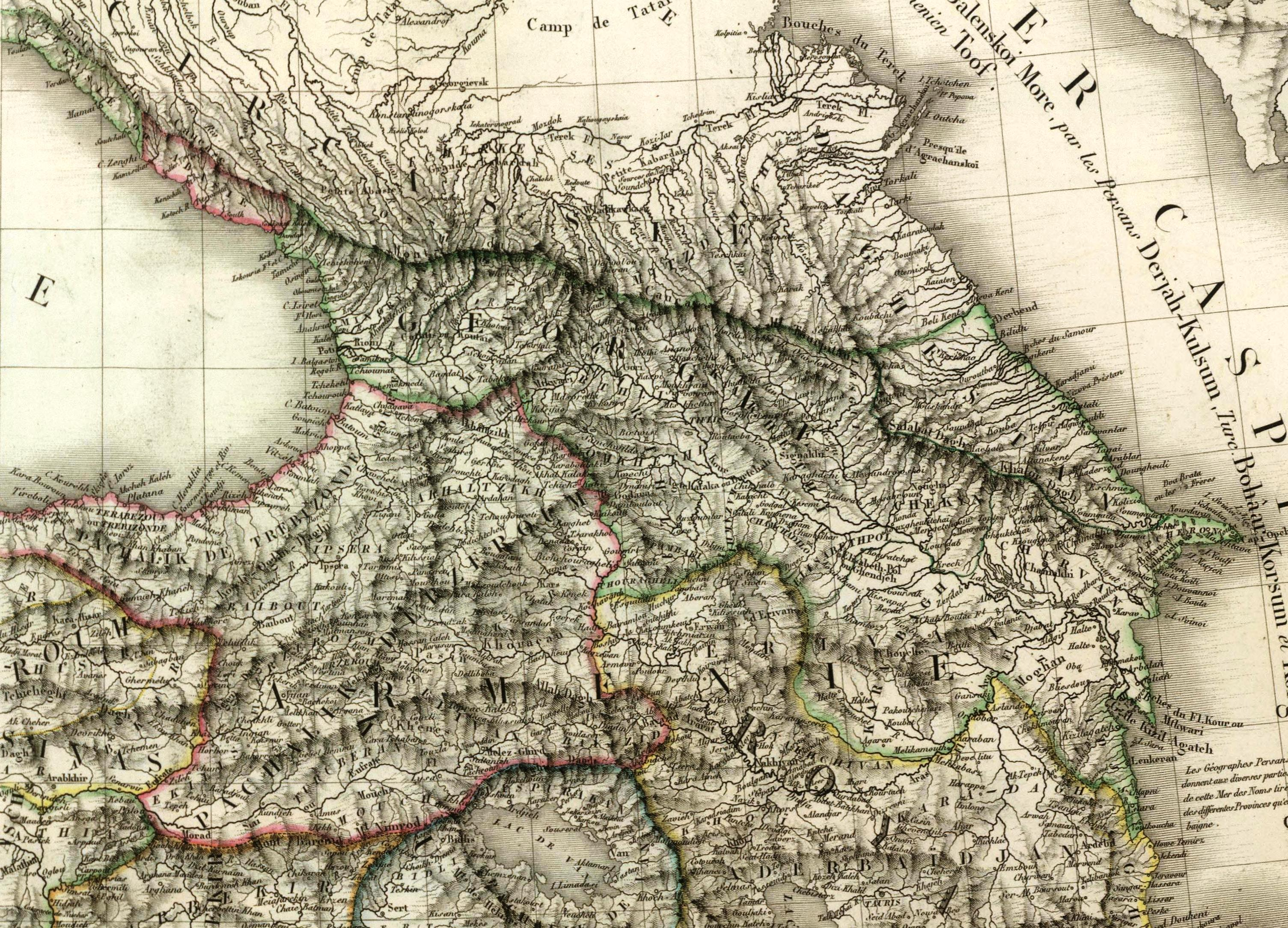 Carte General de la Turquie d'Asie ... les parties limitrophes de la Perse jusqu'a Teheran & les Regiones Caucasiennes. Par L. Vivien, Geographe. Grave par Giraldon Bovinet. 1825. Paris. Chez Menard et Desenne, Libraires Rue Git le Coeur, No. 8. 2eme Feuille.